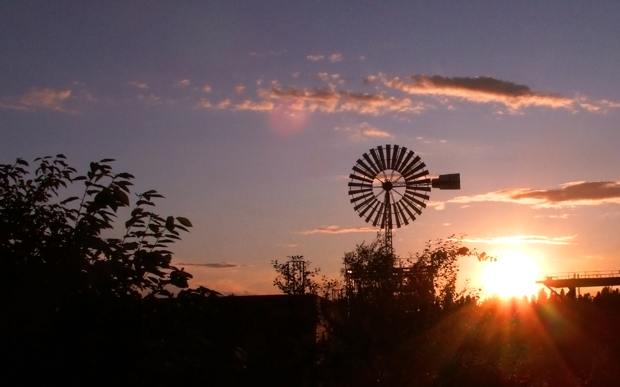 Das Windrad im Landschaftspark-Nord Duisburg